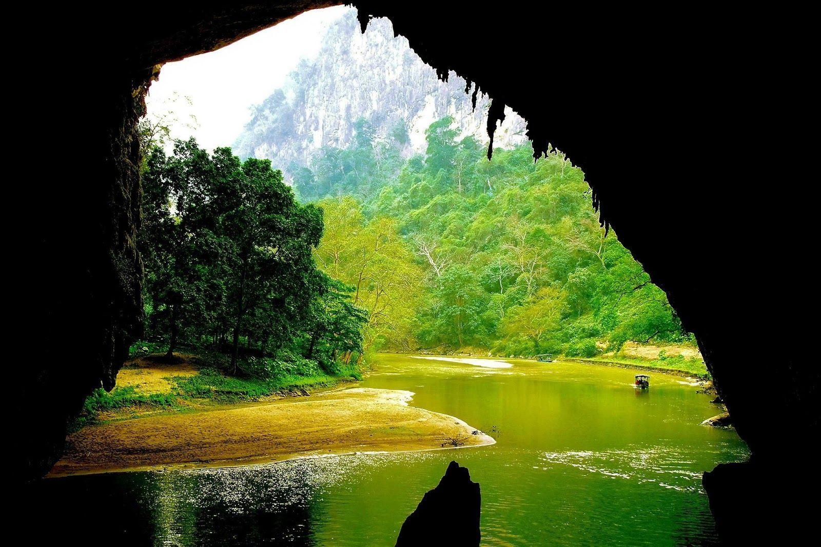 Hua ma cave